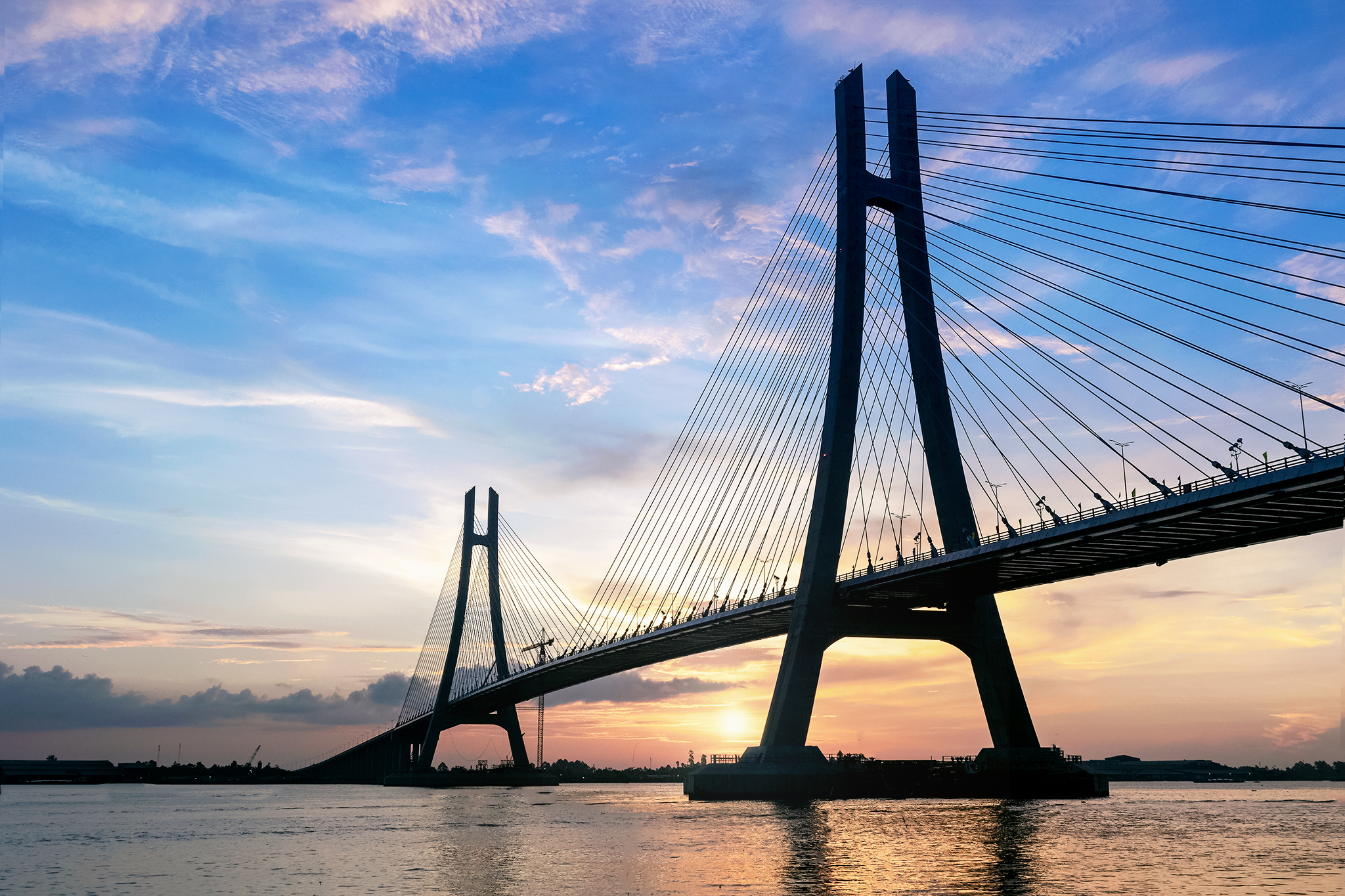 Cầu Vàm Cống, trong nắng sớm. just coverted png to jpg extension